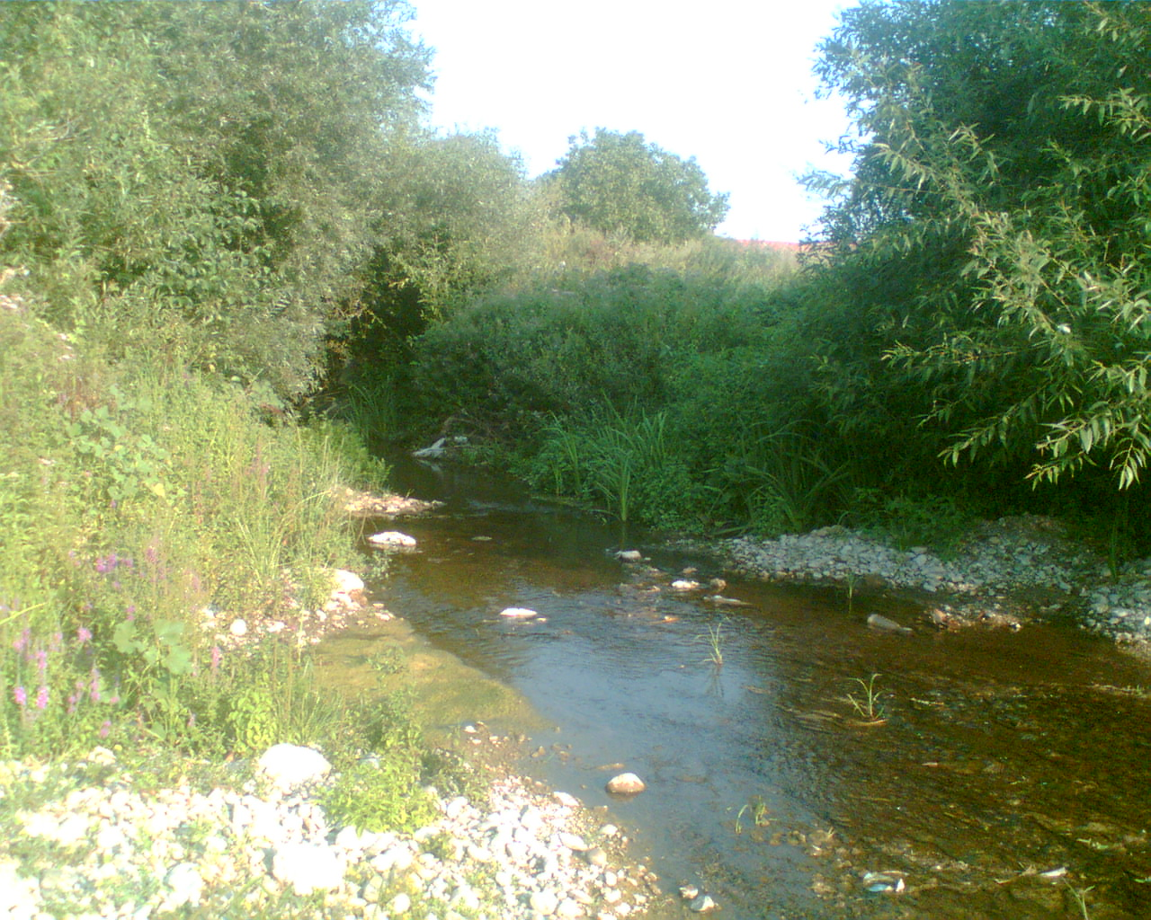 Jasenička Reka bei Milosevo.